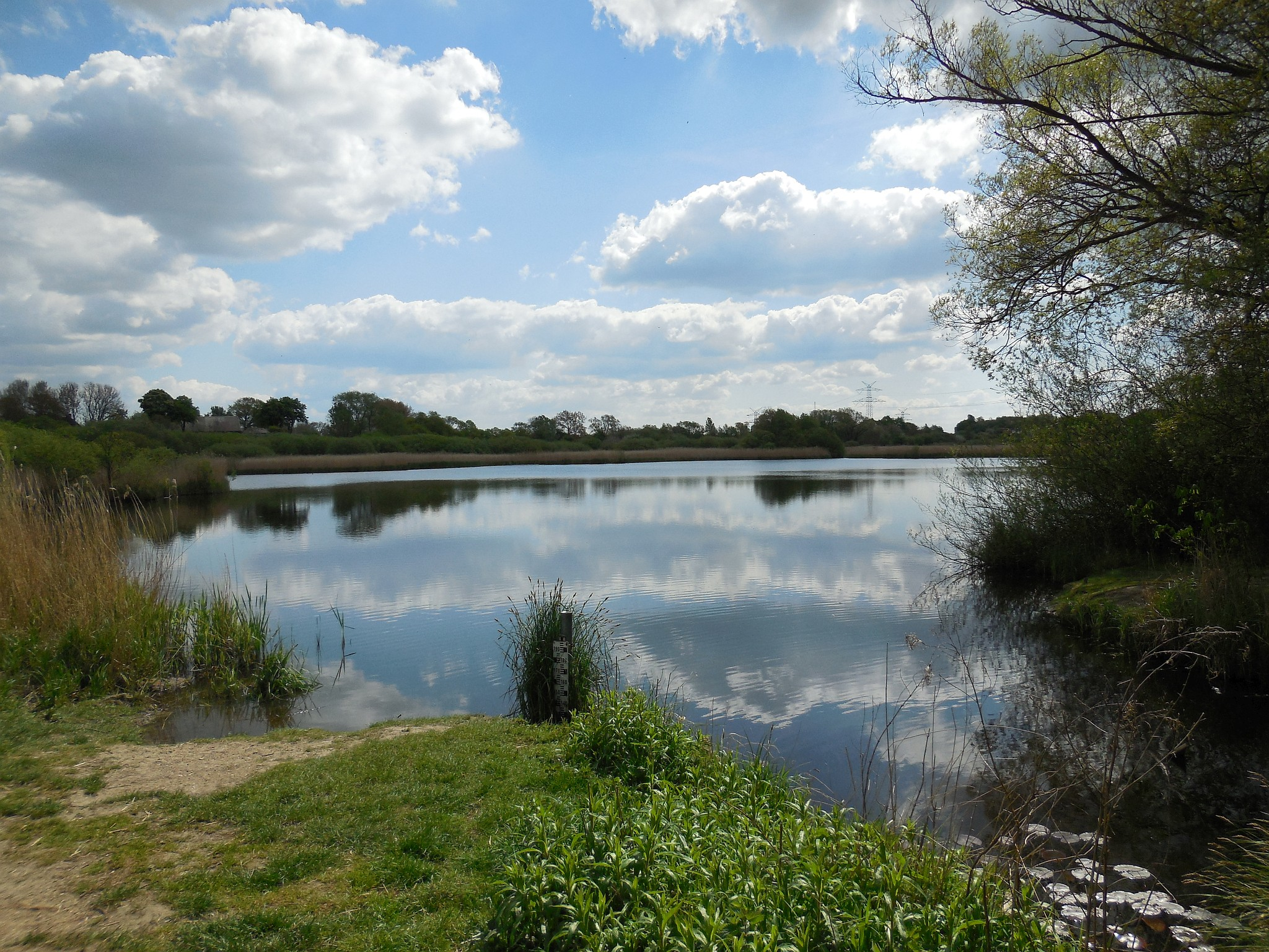 Blick auf den Mönkeberger See im gleichnamigen Naturschutzgebiet.